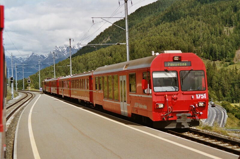 RhB BDt 1751 in Sagliains